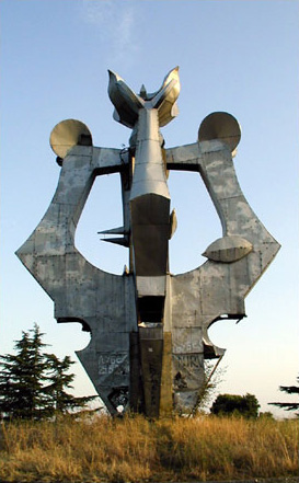 Споменикот Слобода на Вардарски Рид